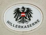 Logo Hillerkaserne